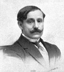 Fotografía del escritor argentino Enrique García Velloso publicada en 1913 con motivo de la representación en Madrid de su obra teatral Fruta picada